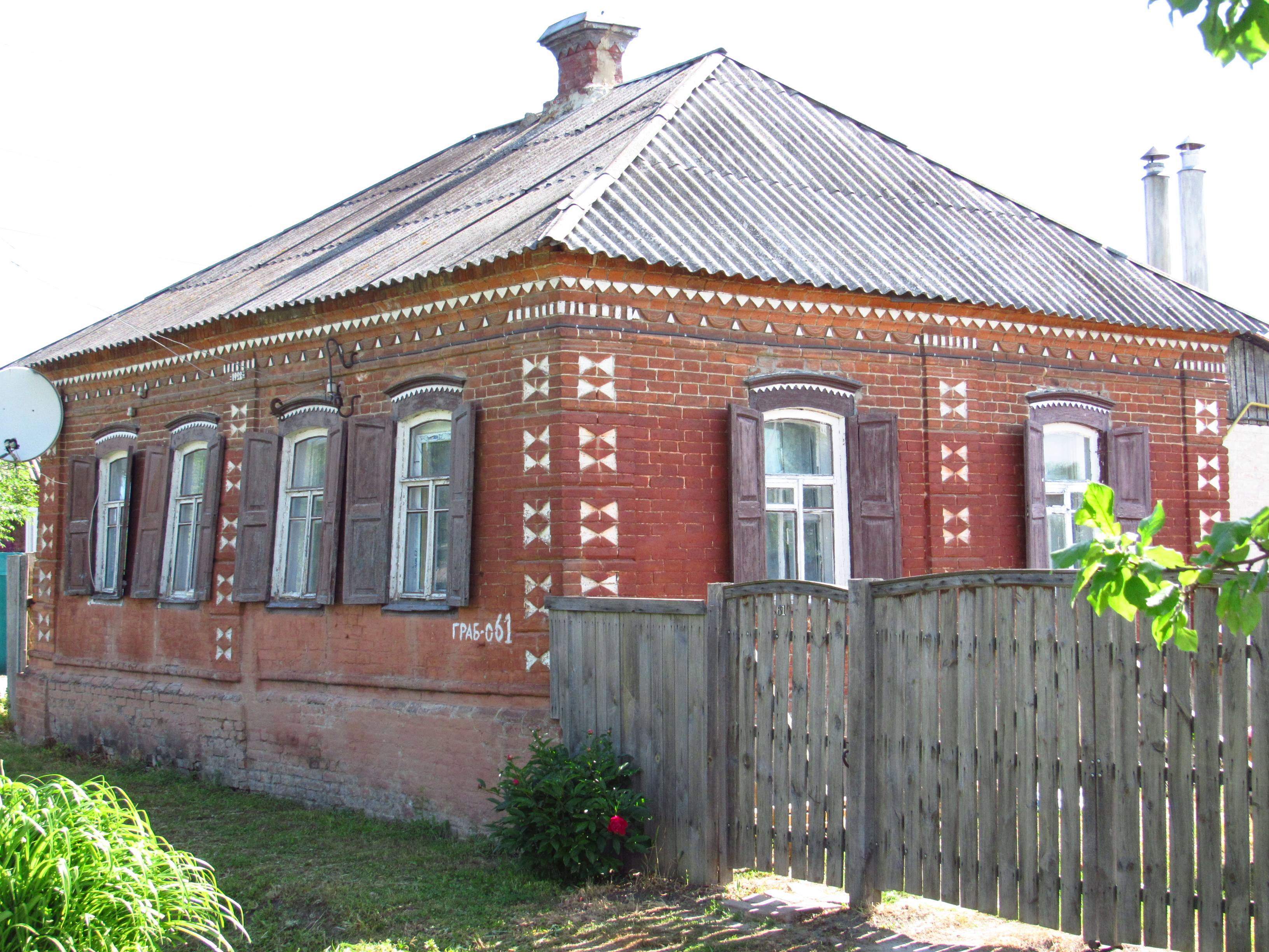 Будинок, в якому жив Багряний І.П. (Лозов'ягін) – український письменник, Охтирка, На розі вул. Грабовського і пров. Багряного